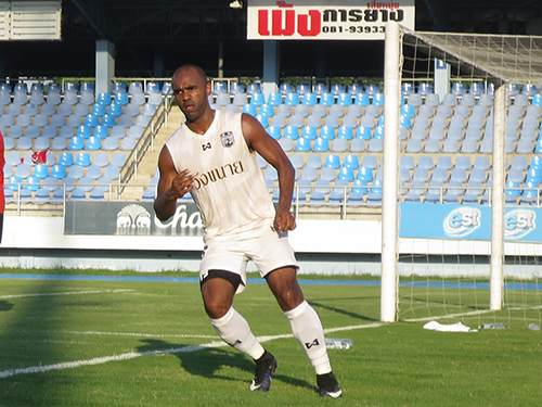 Florent Sinama-Pongolle